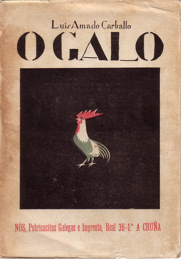 Luis Amado Carballo, O Galo